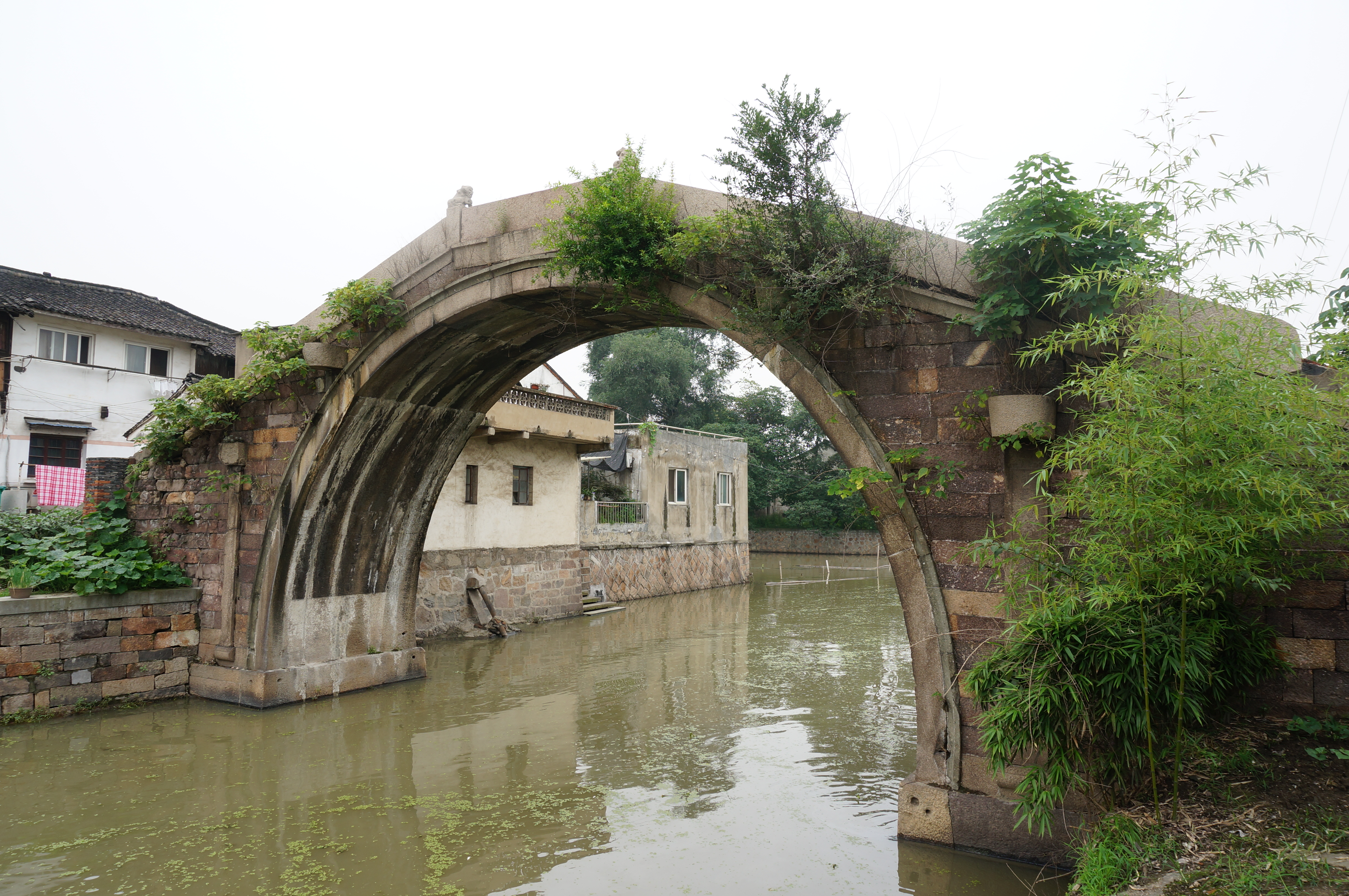 嘉兴桐乡市崇福镇司马高桥，自西南侧望桥底。